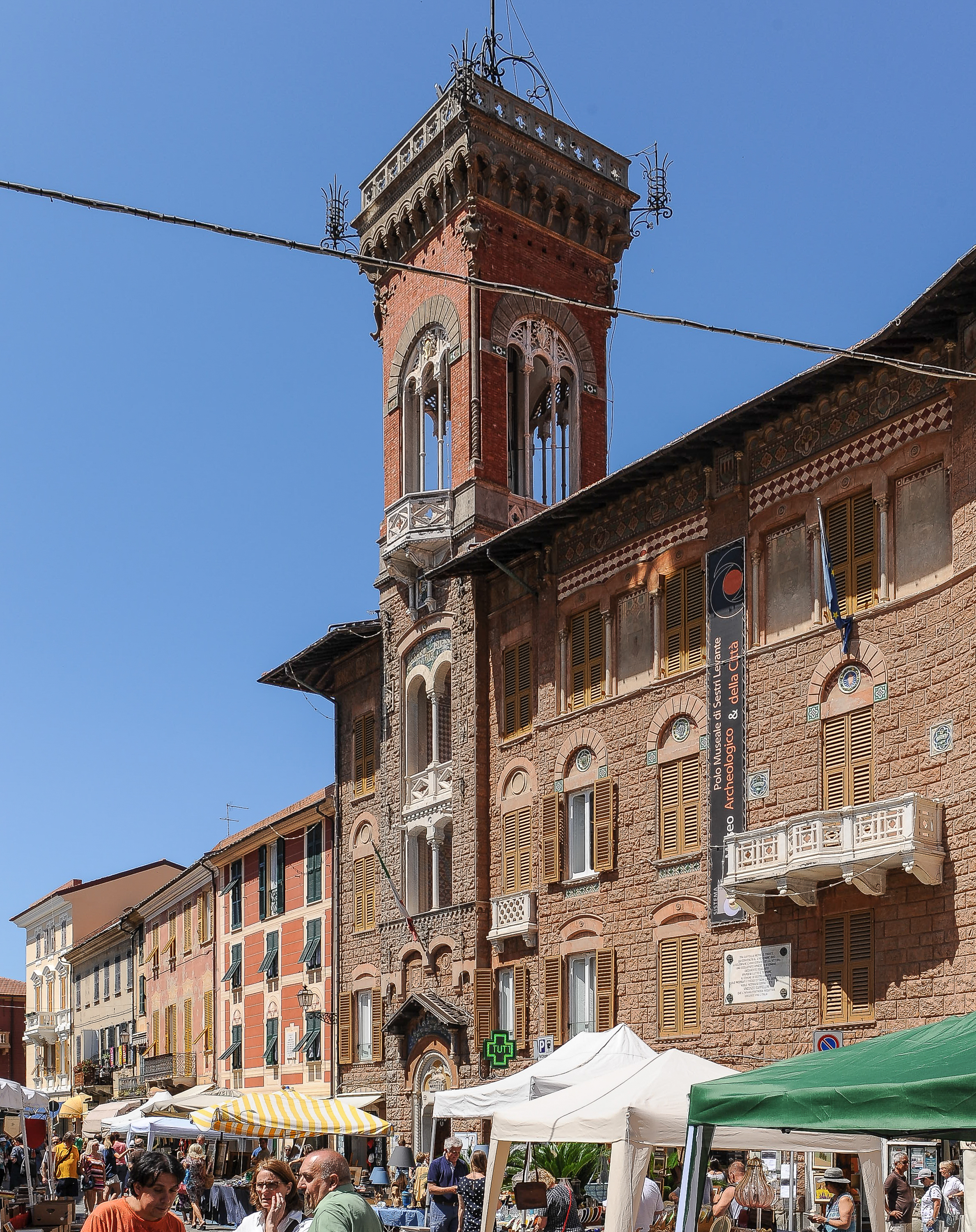 Sestri Levante, Palazzo Fascie Rosse